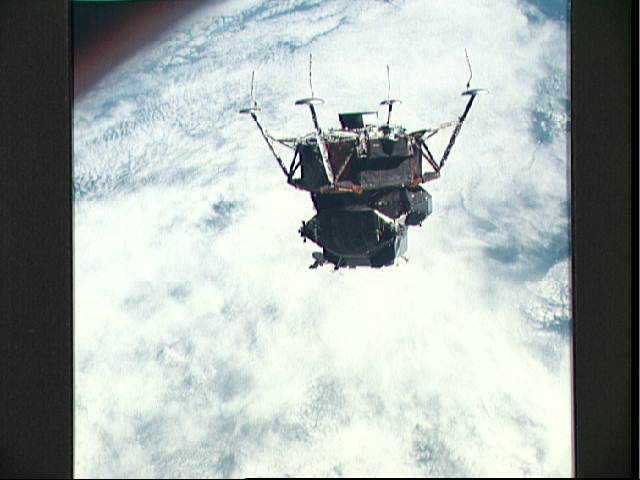 Apollo 9 lunar module above the Earth.